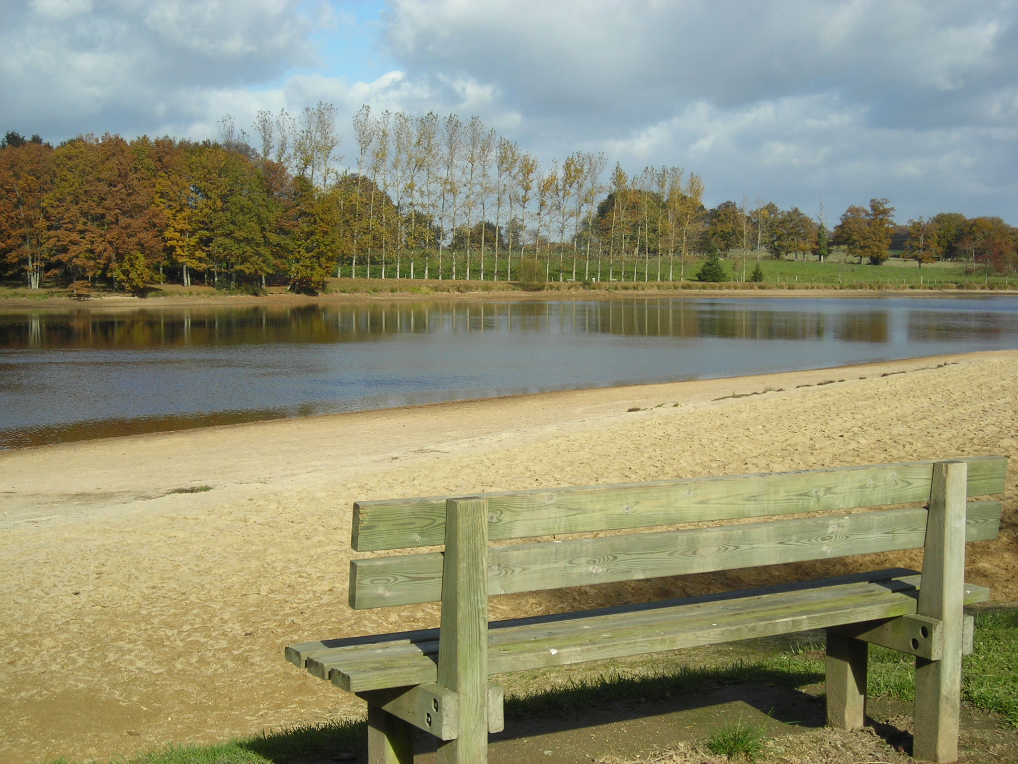 Plage du Cheix